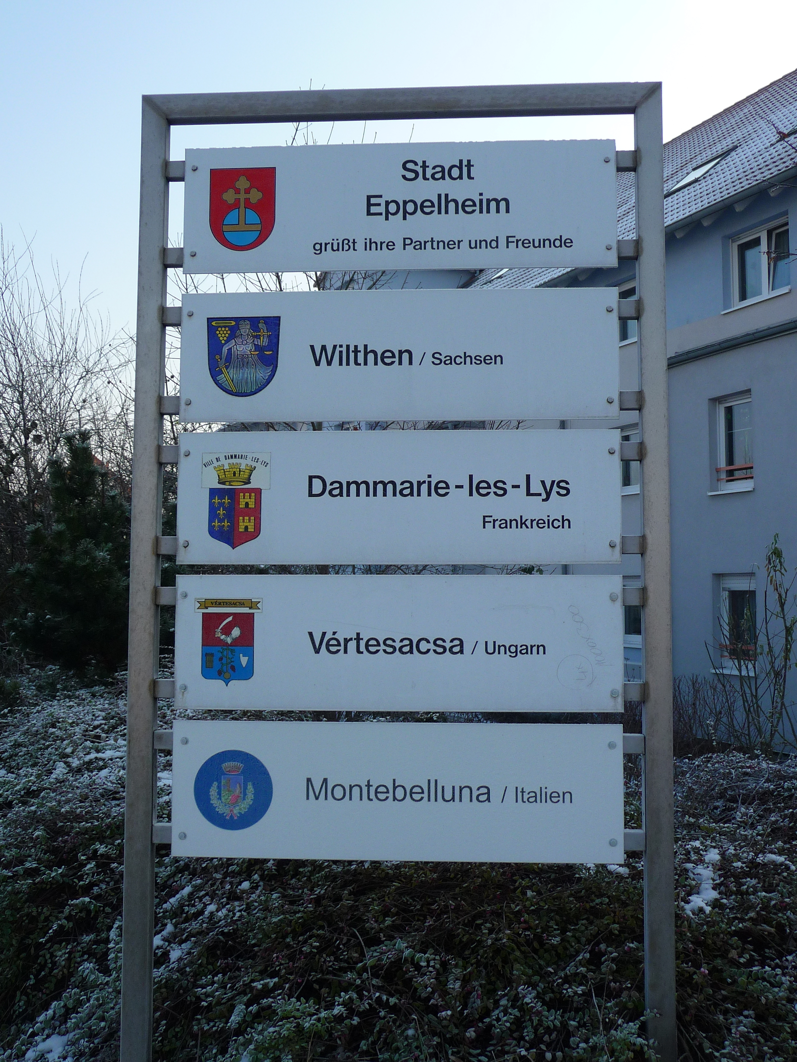 Eppelheim - Infotafel über die Städtepartnerschaften und Städtefreundschaften (Stand Januar 2009)